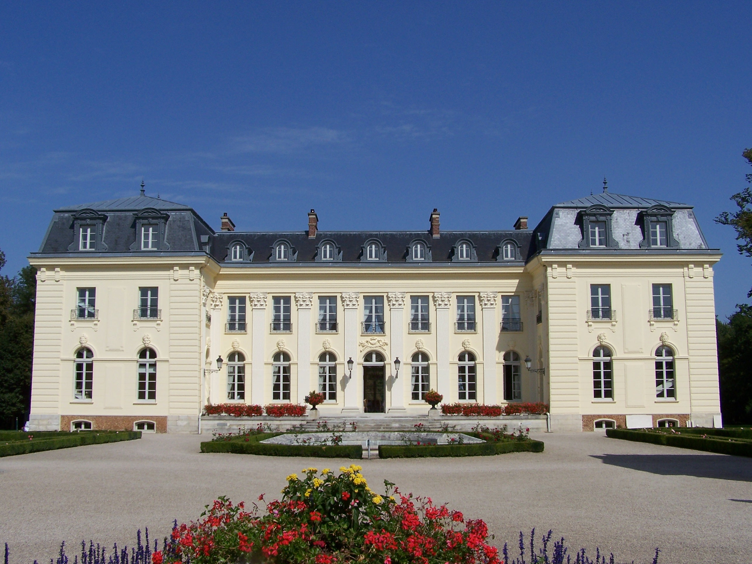 Château de Béhoust (Yvelines, France)